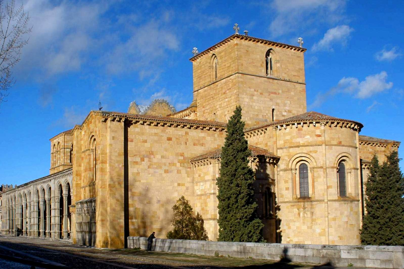 Basílica de San Vicente (Ávila)